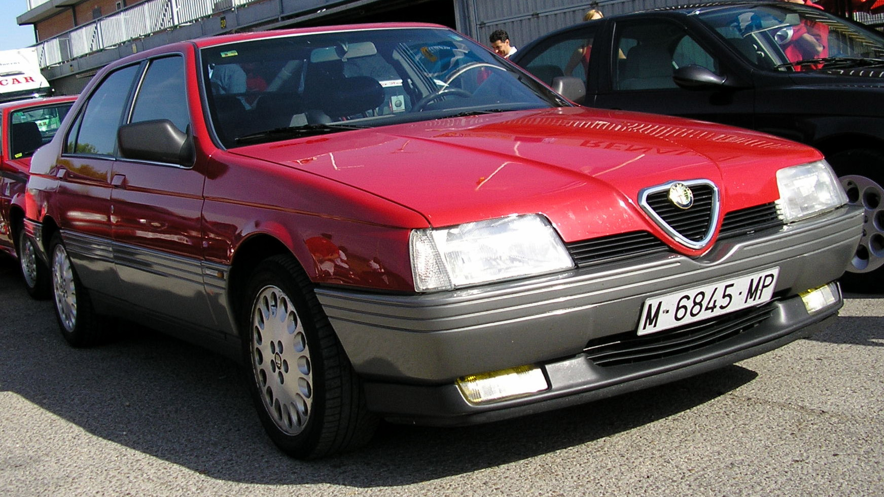 Alfa Romeo 164 shown in Circuito del Jarama (Madrid). Jornada de puertas abiertas 2006.